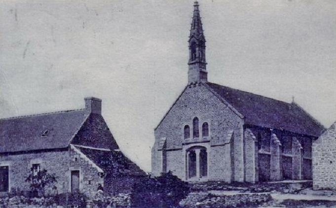 La chapelle Sainte-Anne de Lesconil en 1915. Depuis 1924 elle est l'église de Notre-Dame-de-la-Mer